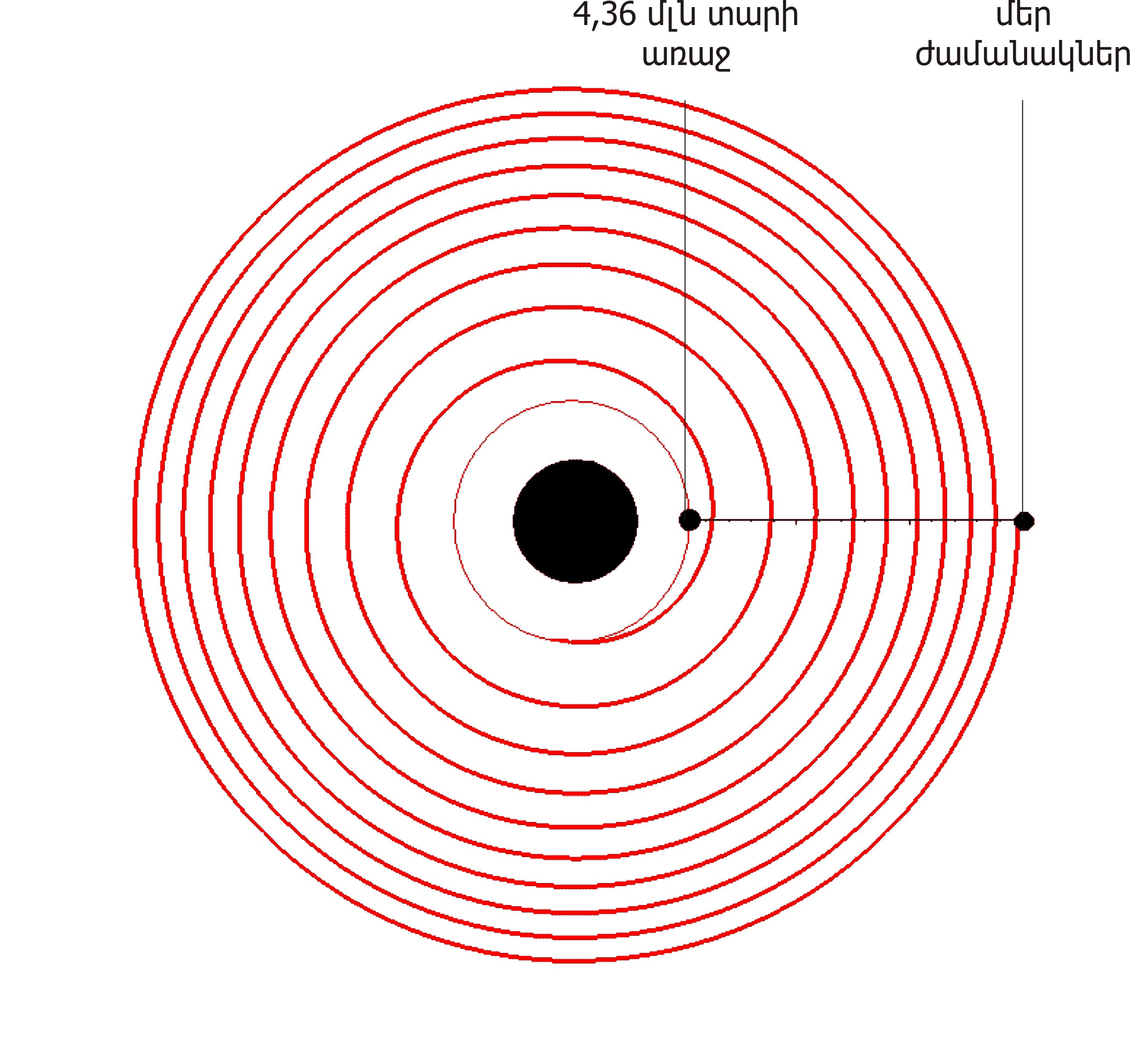 Լուսնի ուղեծրի փոփոխությունը նրա կյանքի ընթացքում